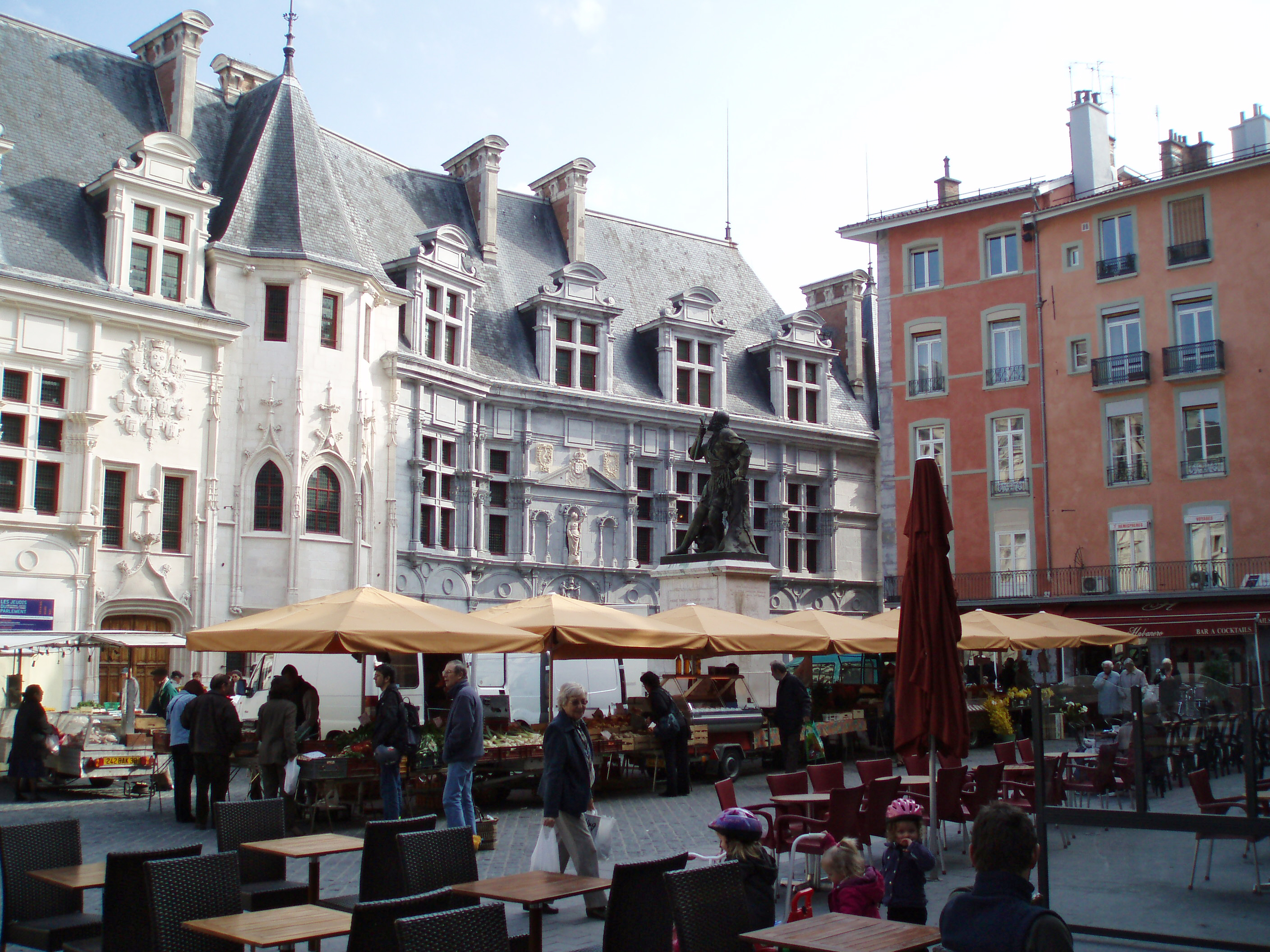 Vue d'ensemble de la place Saint-André, à Grenoble